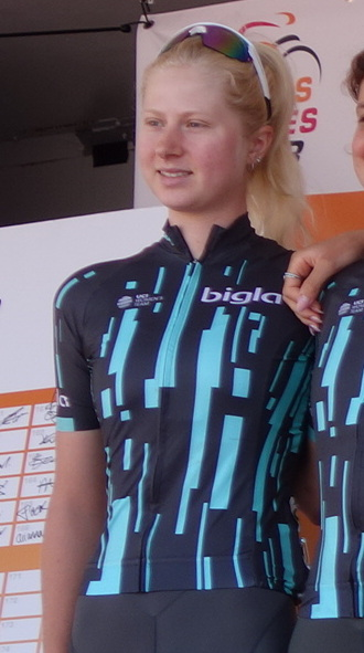 Mikayla Harvey (Bigla) bij de start van de eerste etappe van Stramproy naar Weert in de Boels Ladies Tour 2019